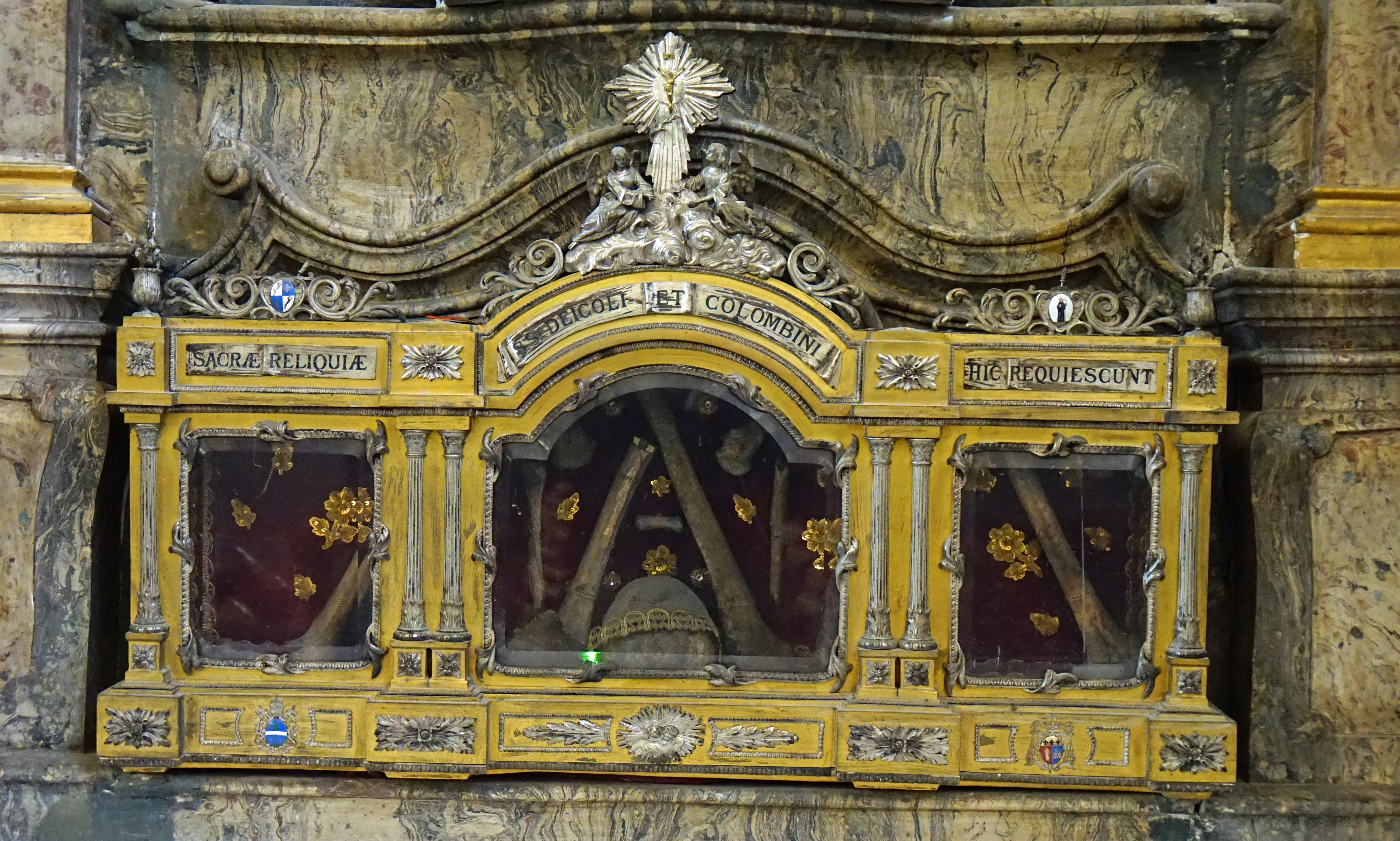 Église Saint-Martin de Lure : reliquaire de saint Desle et saint Colomban.Inscription : Sacræ reliquiæ SS Deicoli et Colombini hic requiescunt : « Les reliques sacrées des Saints Deicoli (Desle) et Colombini (Colomban) reposent ici ».